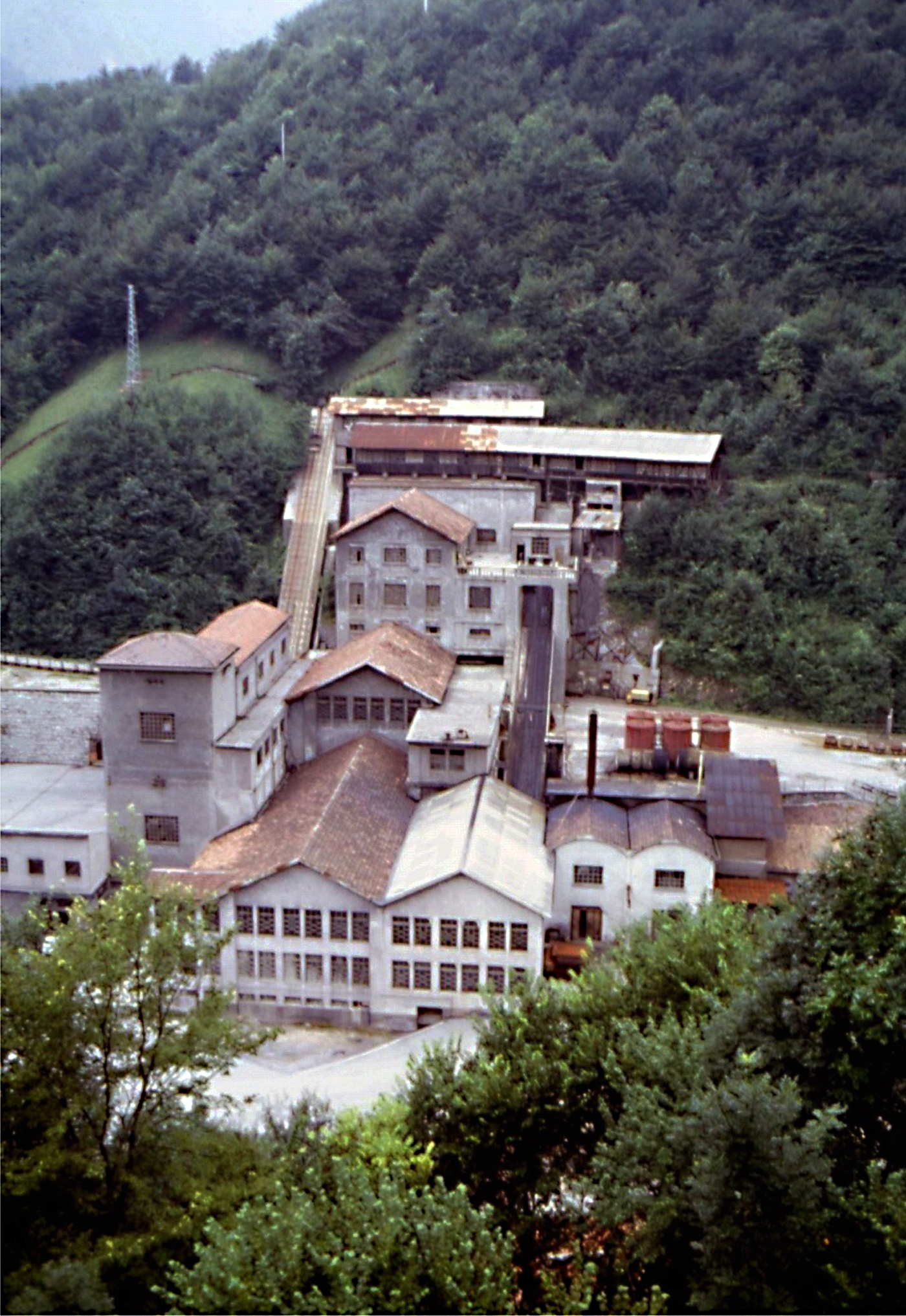 Archeologia industriale: il complesso oggi abbandonato per la lavorazione del minerale, chiamato "Laveria", a Gorno, in Val del Riso (BG)